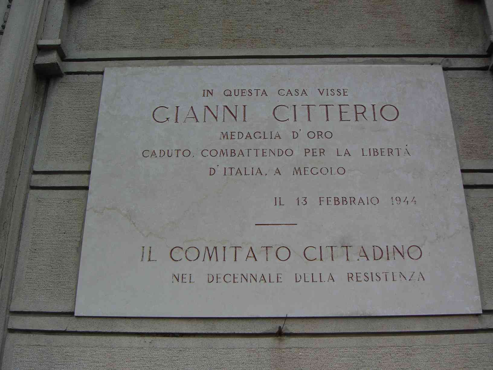 MB Monza targa in memoria di Gianni Citterio, medaglia d'oro per la libertà, al n. 2 della piazza a lui dedicata